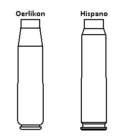 Skillnaden mellan hispano och oerlikon 20 mm hylsa.